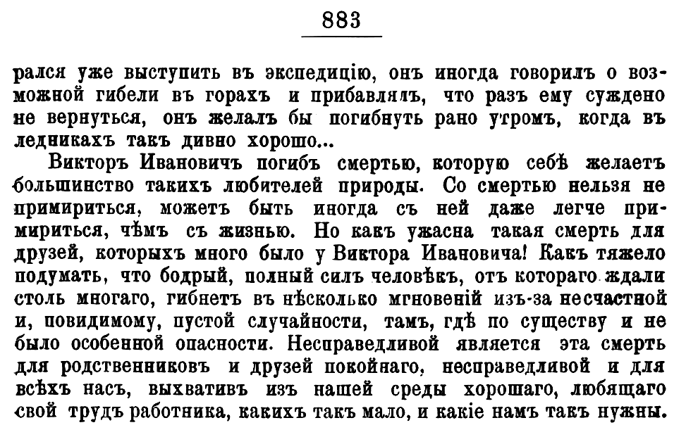 Окончание некролога Некролог Виктора Ивановича Воробьёва Толмачев И. П. Памяти В. И. Воробьева // Известия Императорского Русского географического общества. 1906. Т. 42. Вып. 4. С. 883.